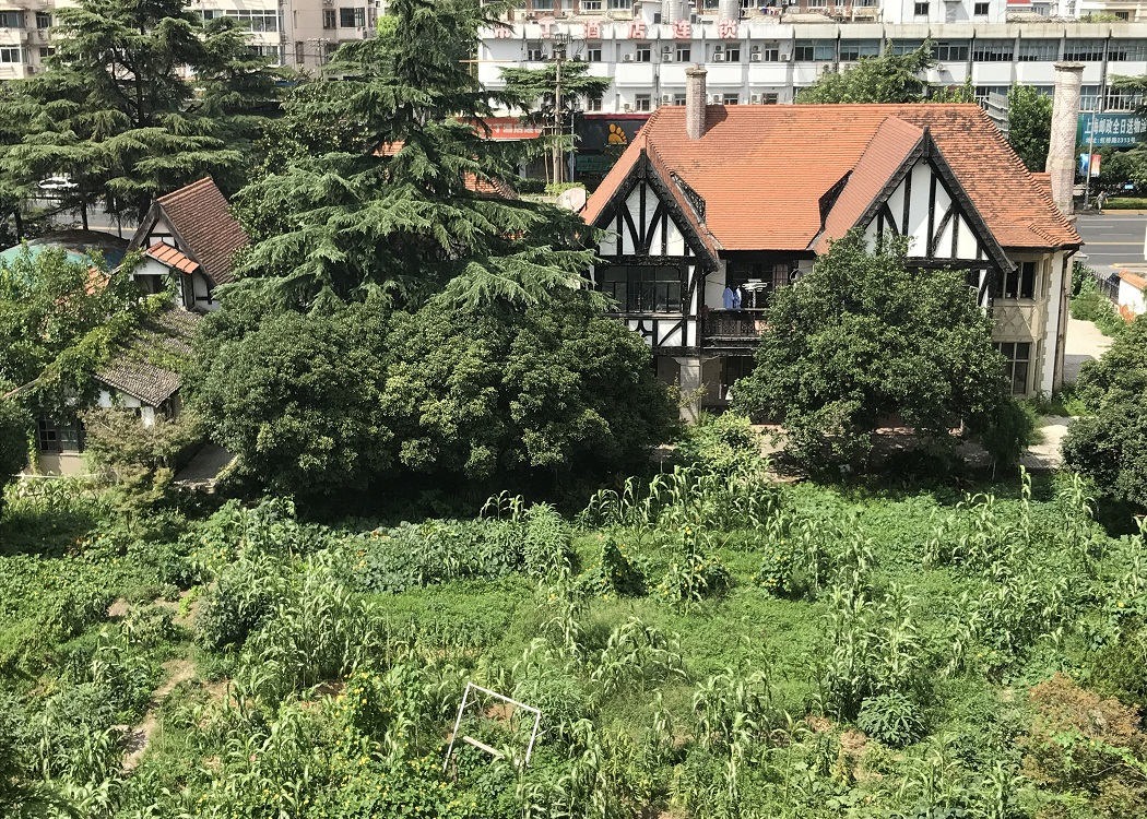 虹桥路2310号住宅 虹桥路2310号 20世纪40年代初